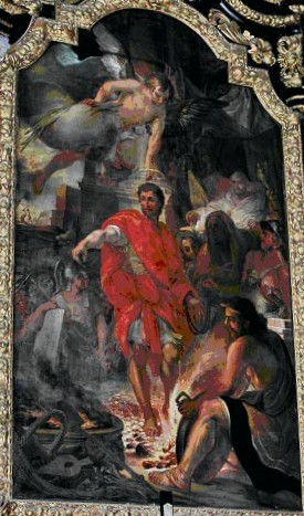 Cosmas Damian Asam: Das Martyrium von Tiburtius, Altarbild in der Kirche St.Veit in Straubing, 1703.